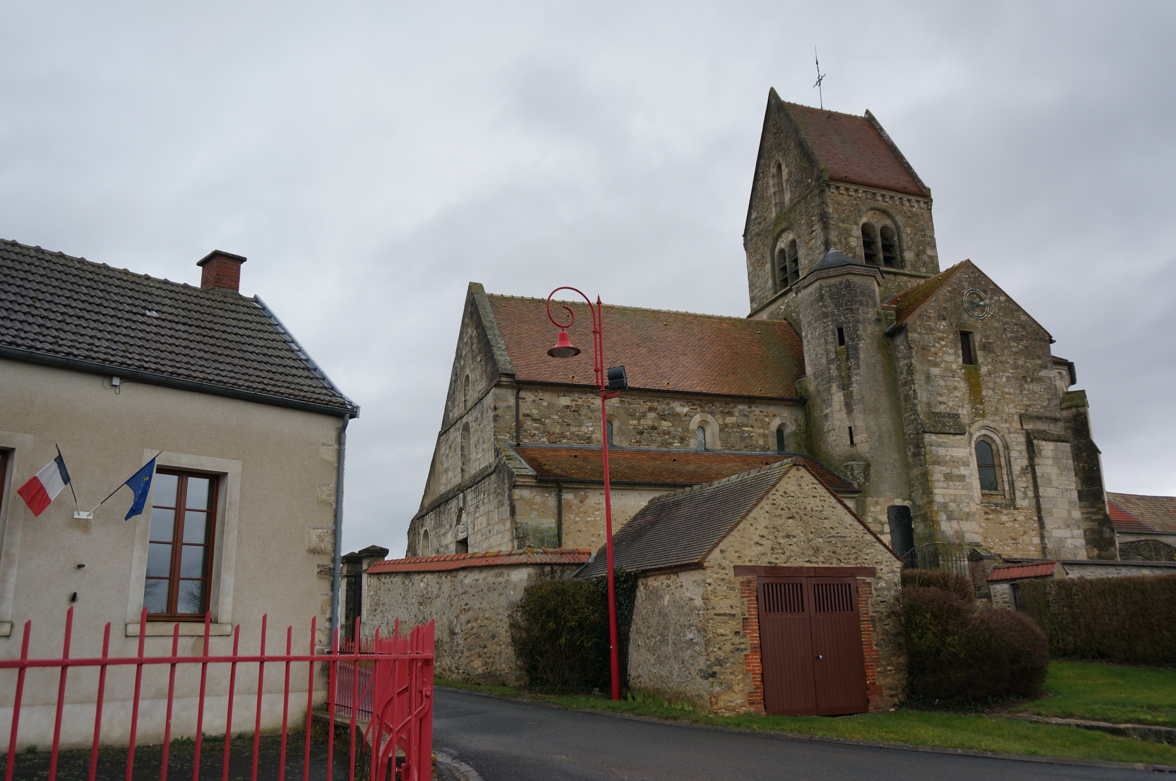 Photo prise à Aougny.